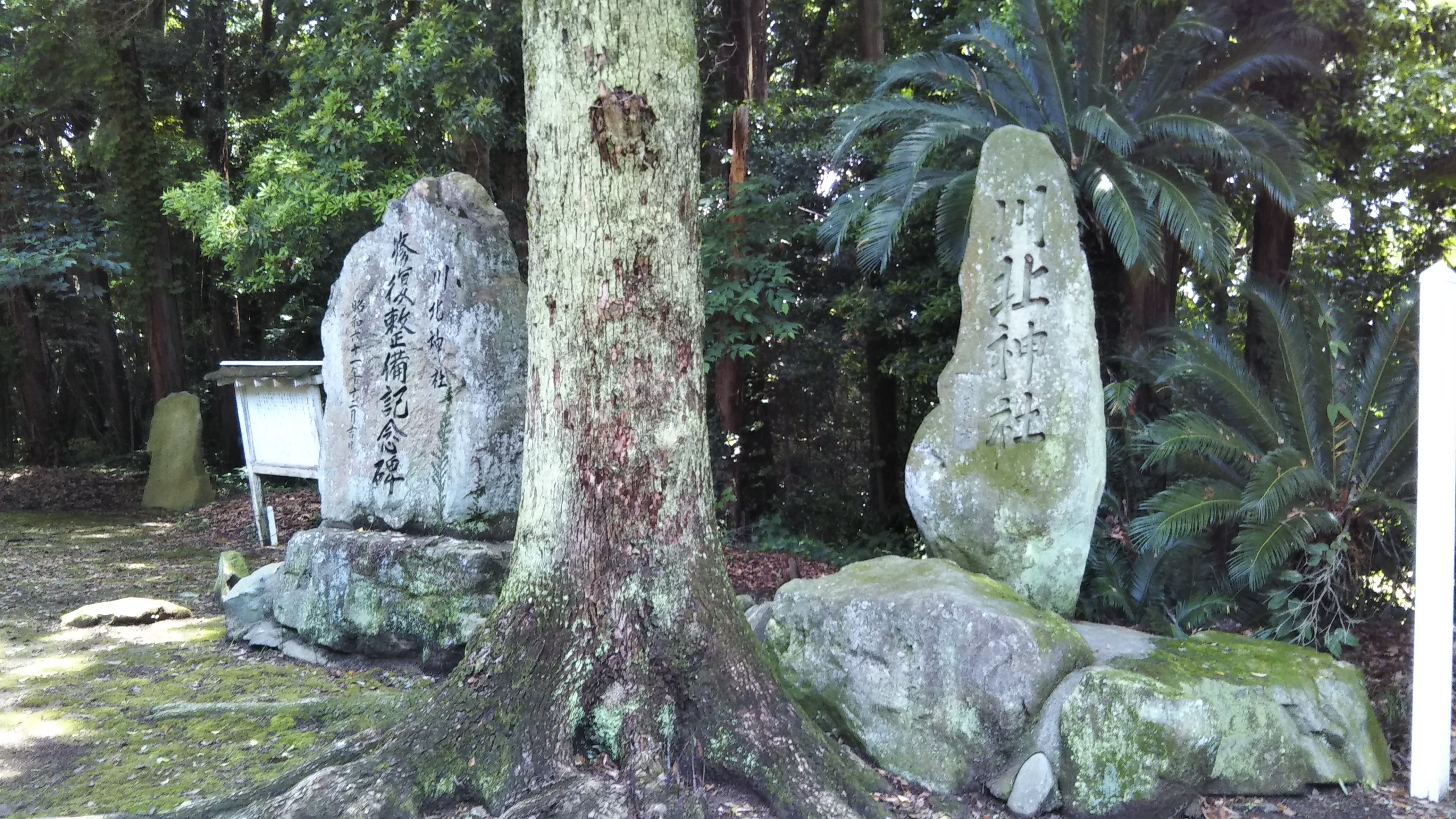 山口県下関市川北神社の石碑。鳥居から見て社殿の右隣にある。